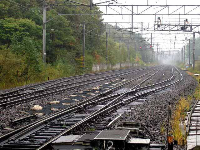 4線の信号場 撮影日 2004年10月11日 撮影場所 信号場そばの踏切 撮影者 投稿者と同じ（Mr-haruka）